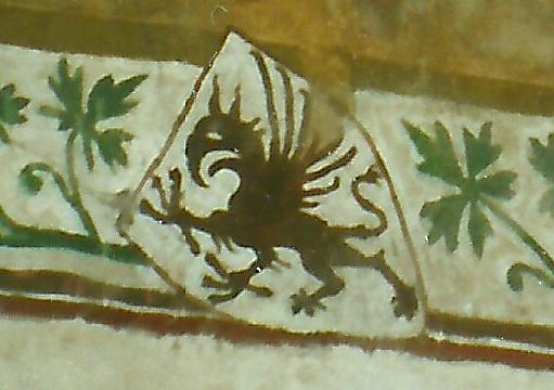 Greifenwappen in der Kirche Behrenhoff um 1240